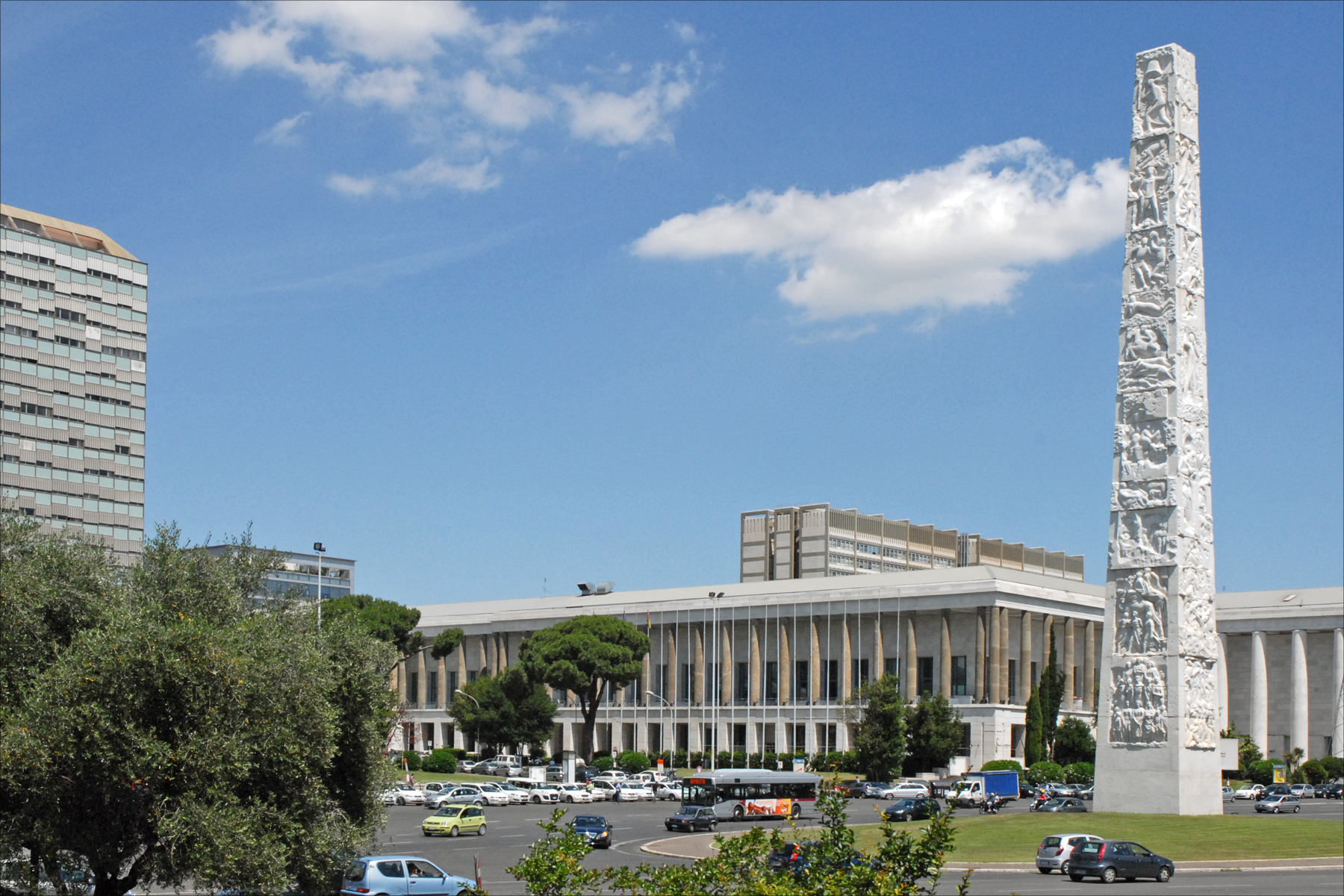 La stèle à Guglielmo Marconi Cette place prévue pour être au centre de l'Exposition universelle a été rebaptisée Piazza Guglielmo Marconi en hommage à l'inventeur de la radio, après avoir été nommée Place Impériale dans le projet fasciste pour l'EUR. Plusieurs bâtiments dont d'importants musées entourent la place. _______________ La création du nouveau quartier de Rome, appelé EUR : Esposizione Universale di Roma, a été décidée en 1936 par Benito Mussolini (1883-1945) pour célébrer le 20ème anniversaire de la marche sur Rome par une Exposition Universelle qui devait se tenir en 1942. Quelques bâtiments ont été construits mais les travaux d'aménagement et de construction ont été stoppés par la guerre. Les architectes chargés du projet étaient : Marcello Piacentini entouré de Giuseppe Pagano, Luigi Piccinato, Ettore Rossi, Luigi Vietti. Les travaux ont repris en 1951 avec l'ambition de faire de l'EUR un quartier d'affaires associé à une zone urbaine d'habitation reliée par le métro à Rome et par le train à Ostie.